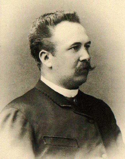 Eduard Wolf (1855-1905), deutscher Fabrikant und Kommunalpolitiker